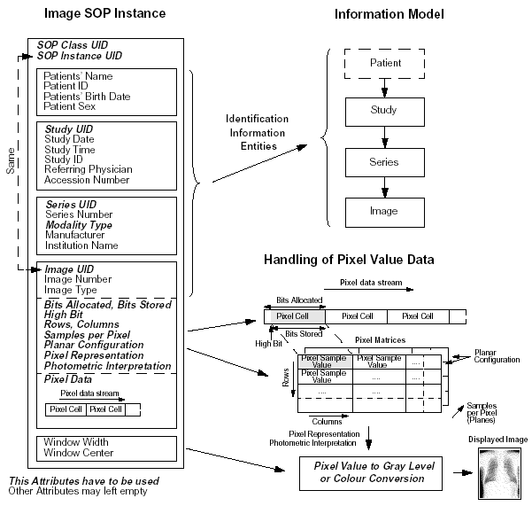 Части DICOM Стандарта.